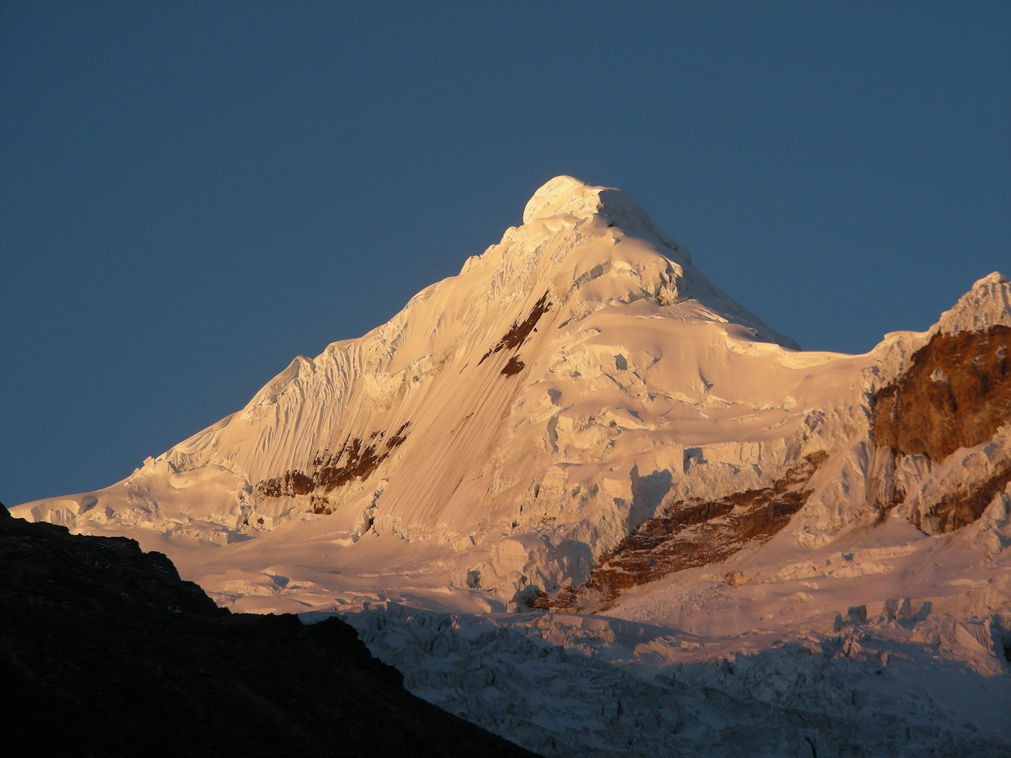 Tocllaraju